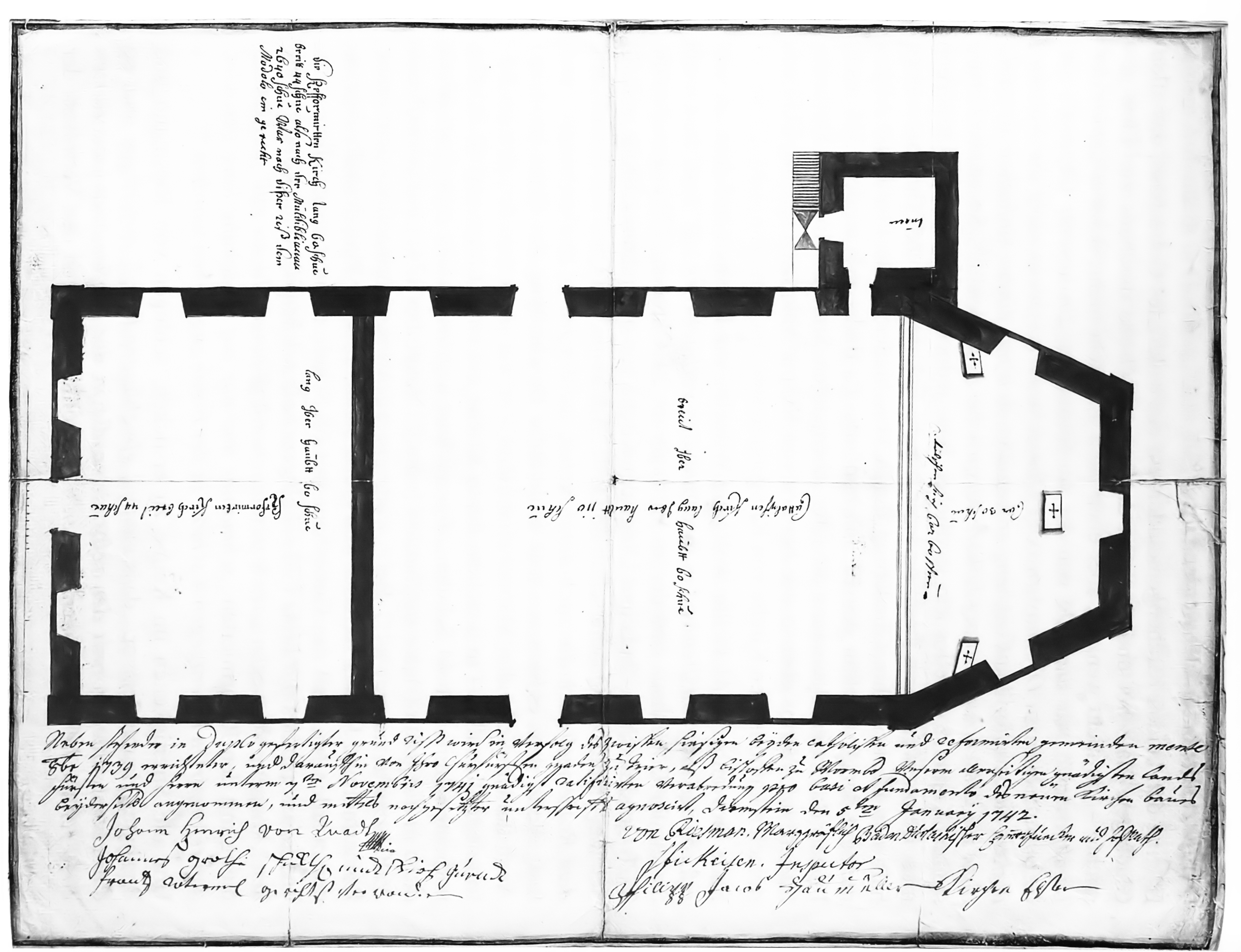 3. Grundriss der Laurentiuskirche zu Dirmstein, 1742 durch Franz Rothermel nach der Vorlage von Balthasar Neumann gezeichnet